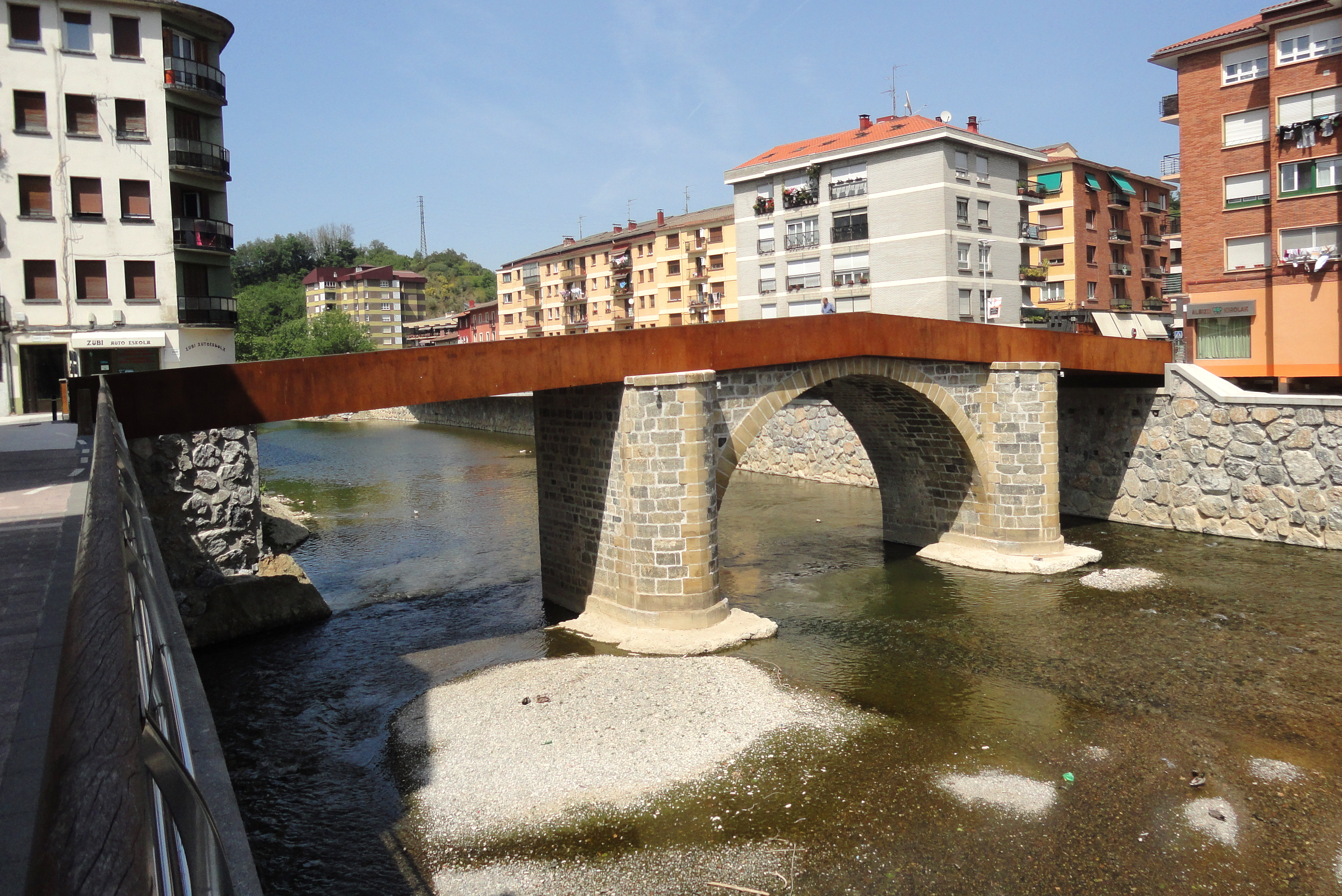 Zubimusu zubia - Villabona